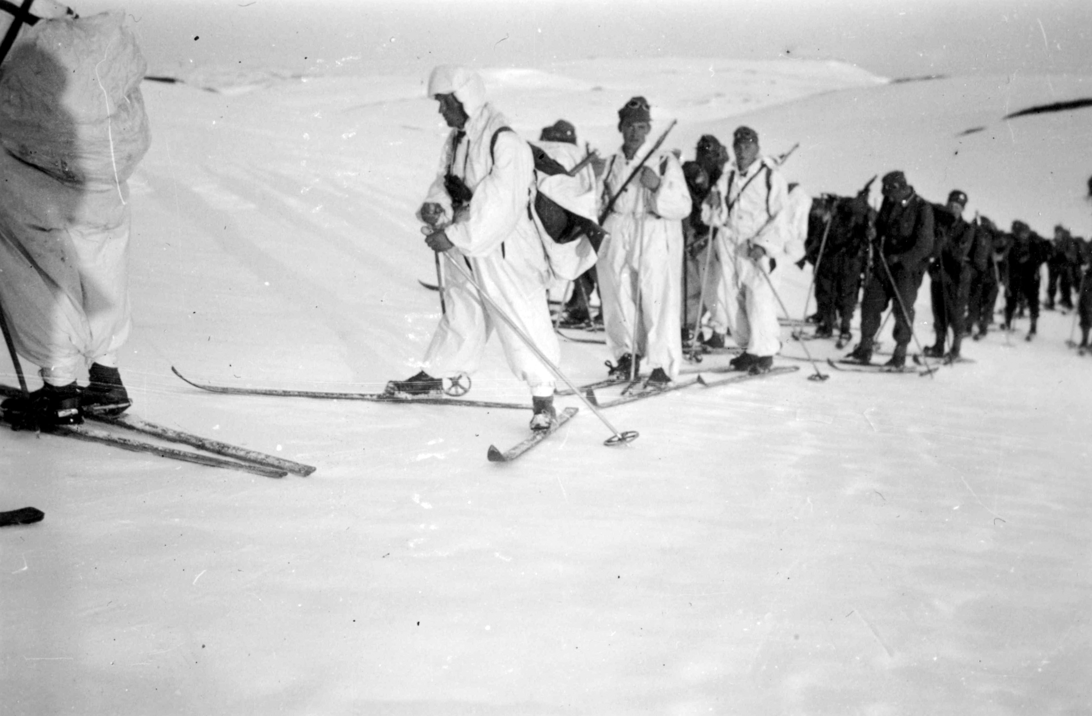 På ski over Korgfjellet Tittel / Title: Østerriske bergjegere fra 2. bergjegerdivisjon på vei over Korgenfjellet. Også med ski gikk de mot fienden. Dato / Date: Mai. 1940 Fotograf / Photographer: Karl Marth Sted / Place: Korgfjellet, Nordland, Norge Eier / Owner Institution: Arkiv i Nordland Lenke / Link: Arkiv i Nordland Arkivreferanse /Archive reference: AIN.NA143.0157 Fra Dag Skogheims Privatarkiv Tekst bak på bildet: Wahrscheinlich Elsfjord- Korgen (Noe uleselig på tysk)